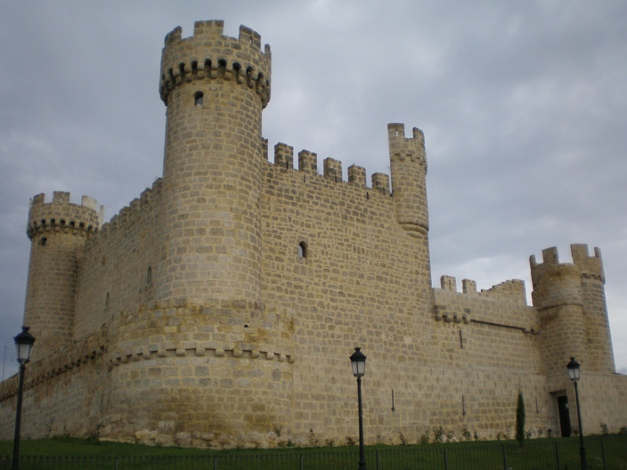 Descripción: Parte trasera del Castillo de Olmillos de Sasamón Fecha:20/06/2008 Autor: Sandra González